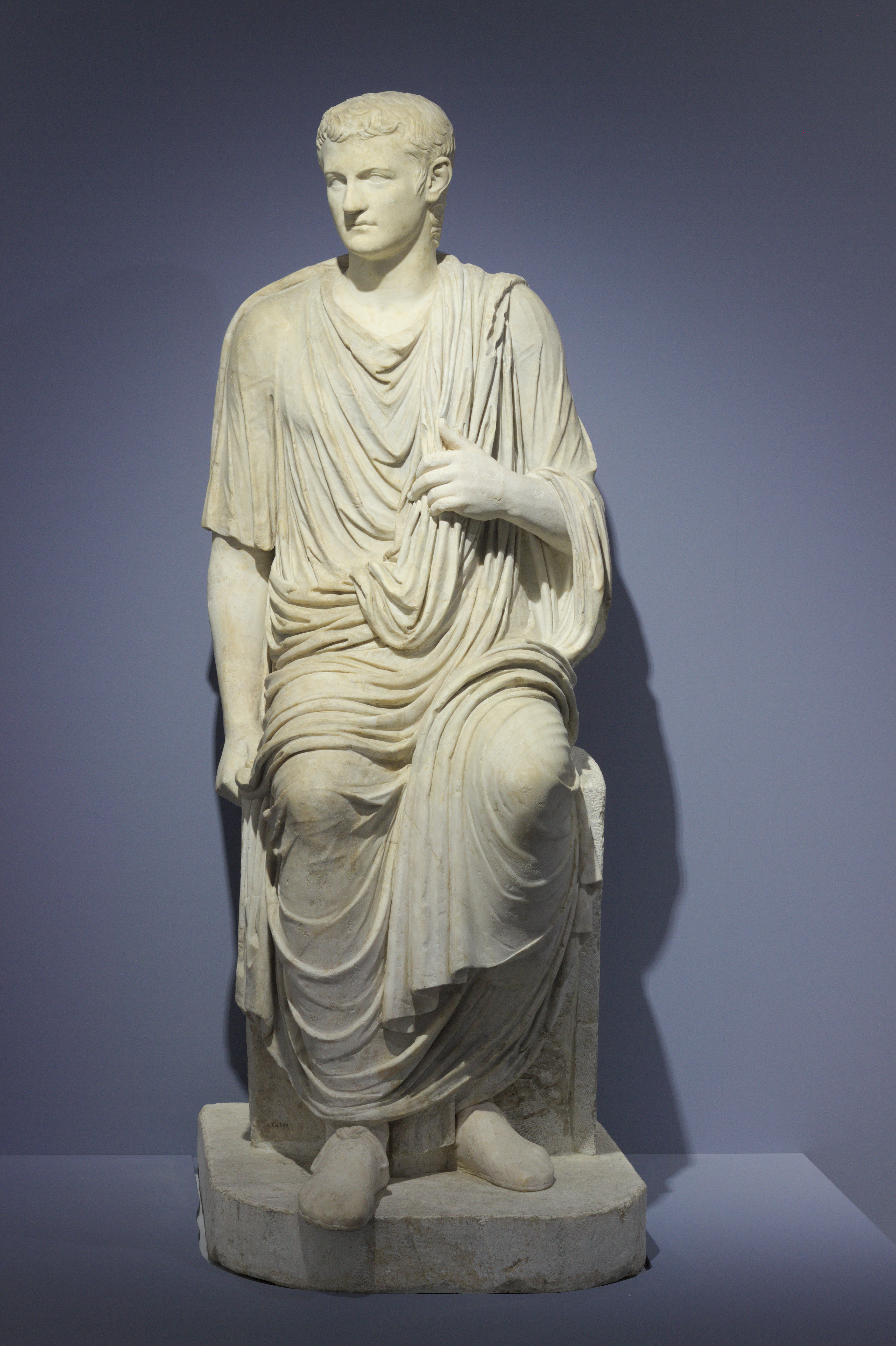 Caligula, marbre.